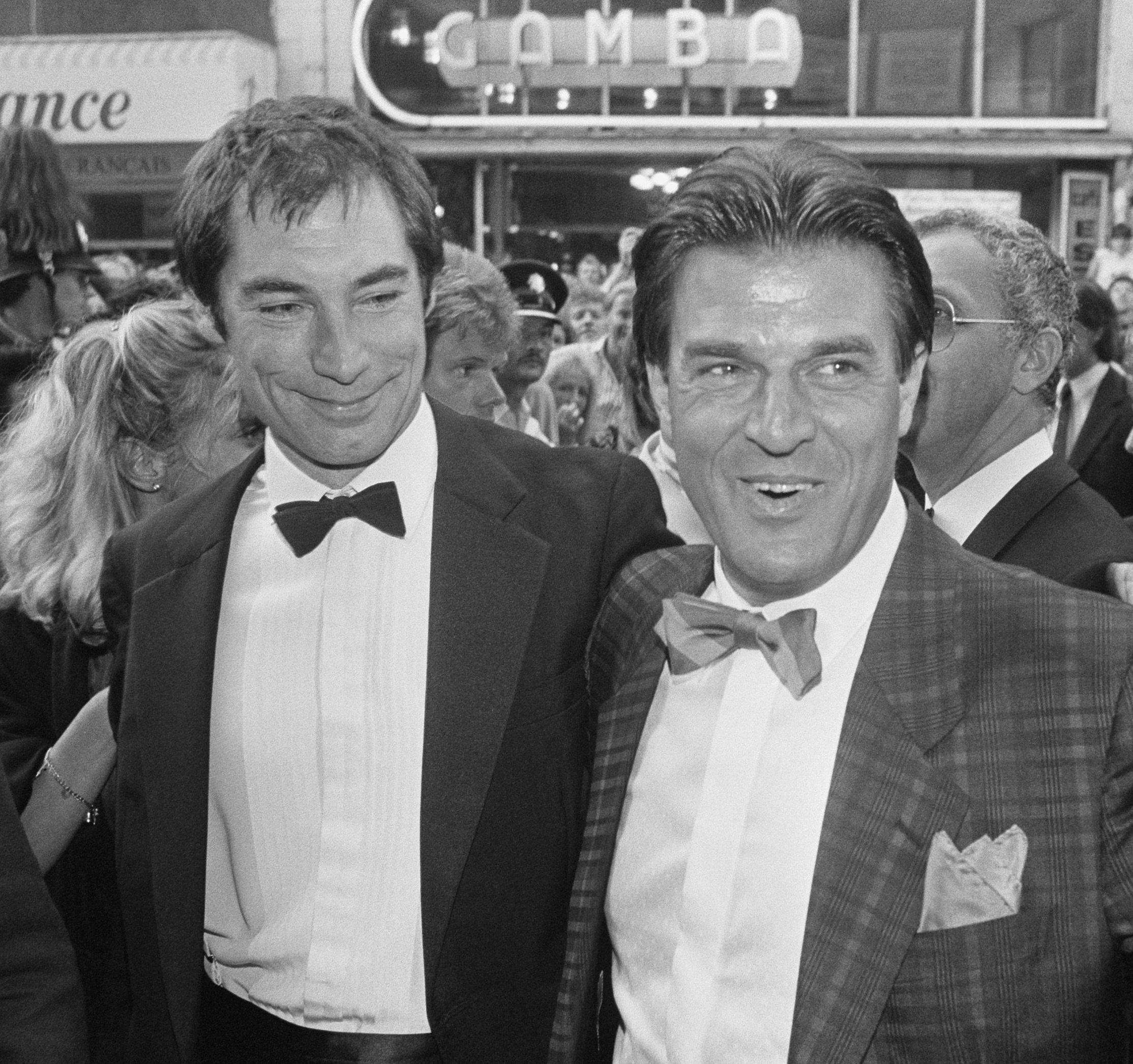 Gisteravond première James Bondfilm 'The Living Daylights in Tuschinski; Timothy Dalton en Jeroen Krabbé (r) bij aankomst